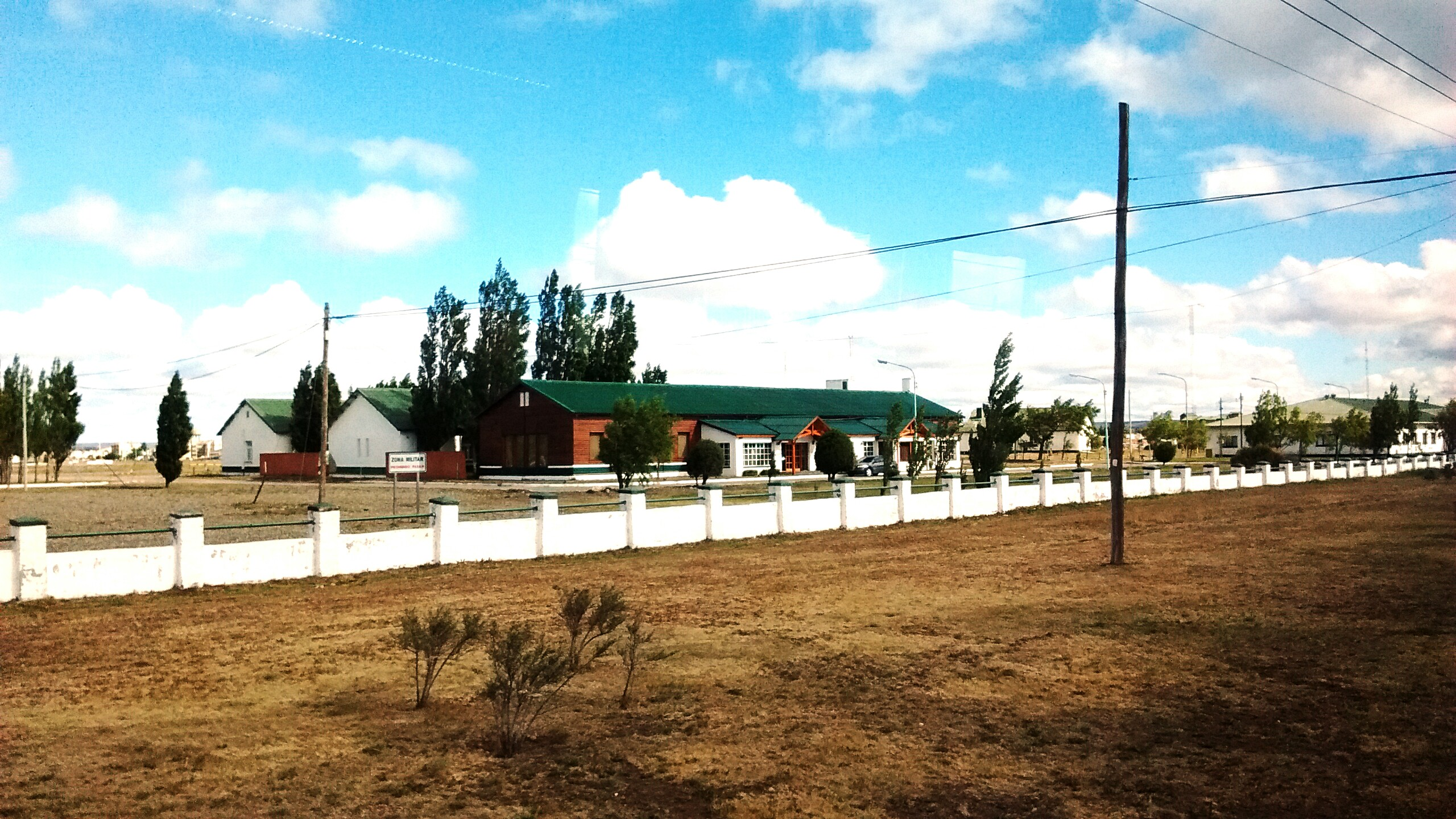 Instalaciones del ejército en Gallegos desde la ruta